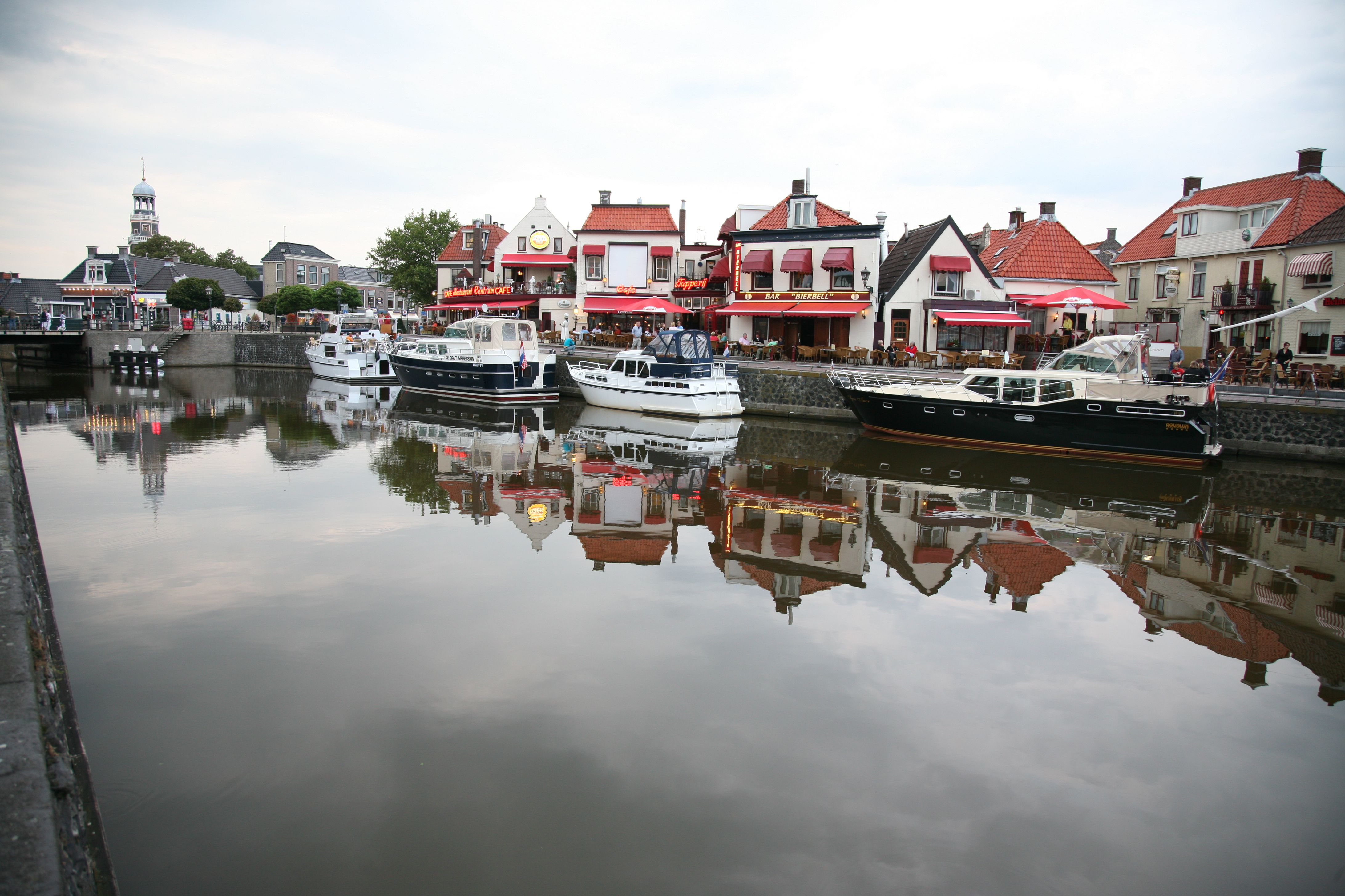 lemmer (53)